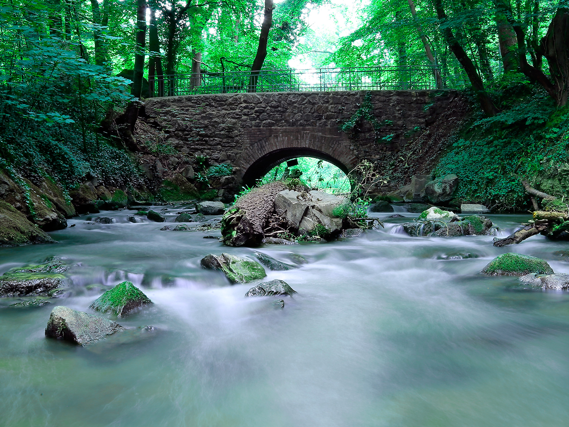 Diese Aufnahme entstand im Naturschutzgebiet Neandertal in NRW. Bei dem Fluss handelt es sich um die Düssel, zwischen den Städten Mettmann und Erkrath.